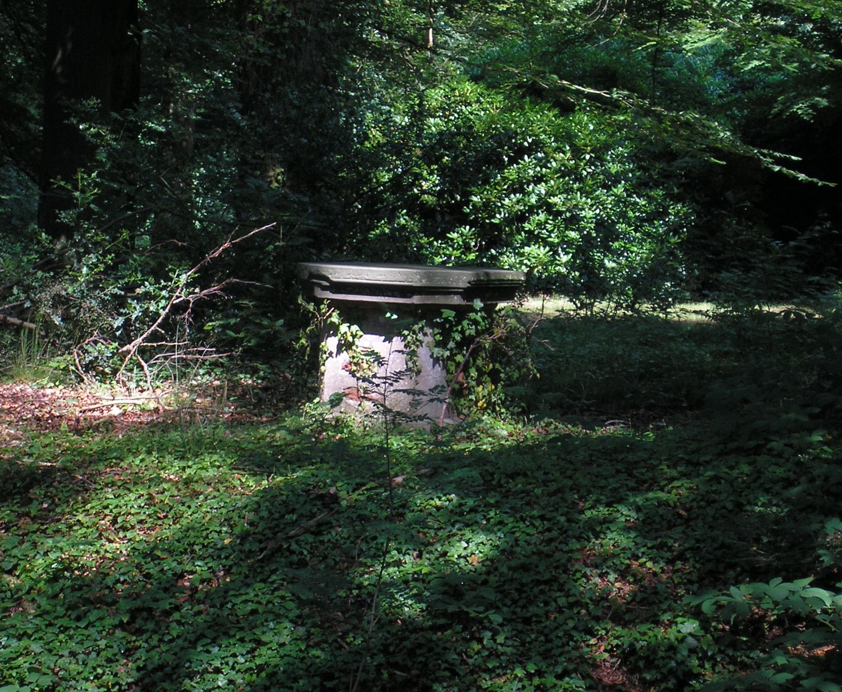 Eigen foto gemaakt zomer 2006. CdZ 19 feb 2007 22:10 (CET)